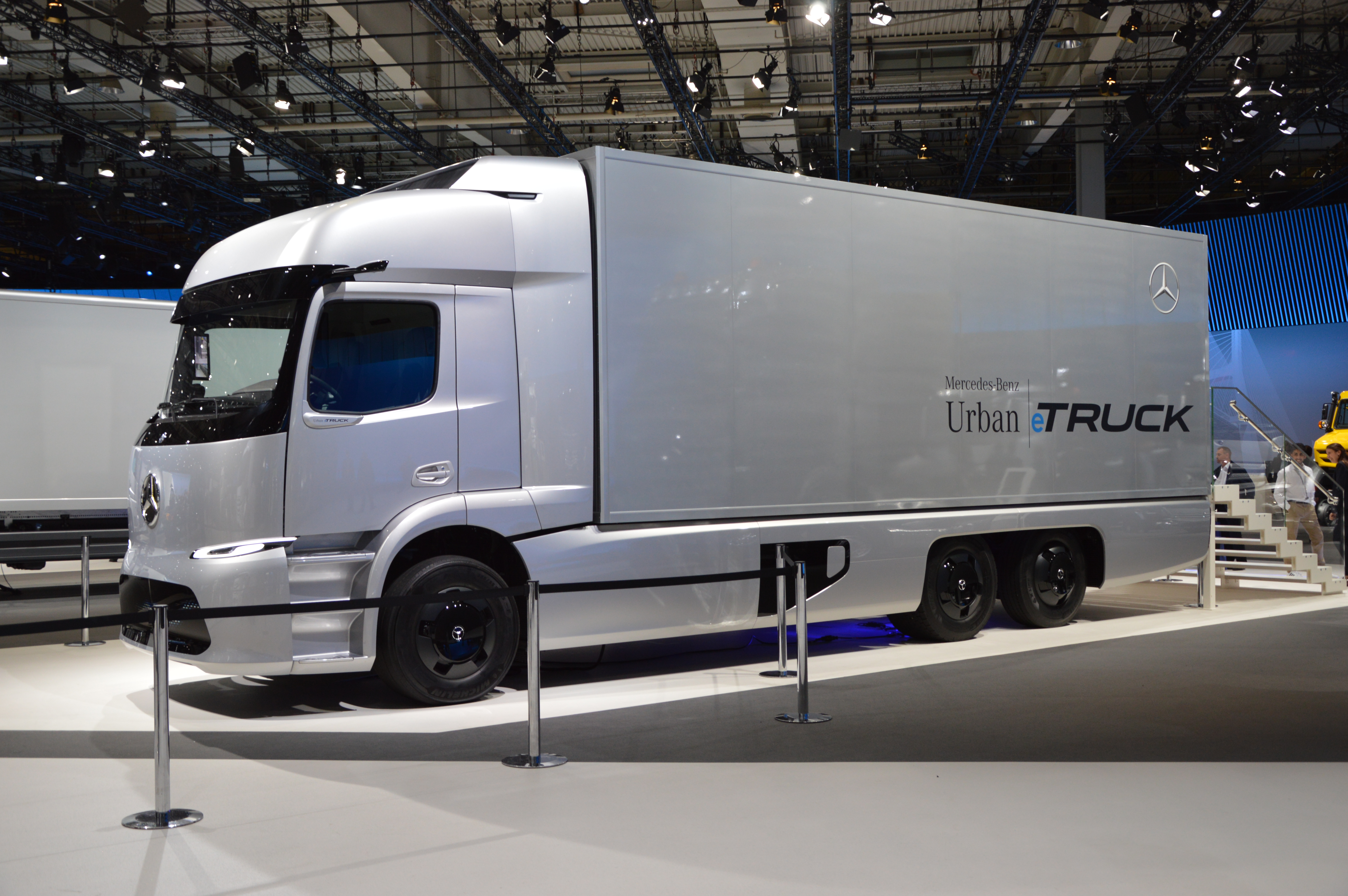 Mercedes-Benz Urban etruck. Photo taken at IAA 2016.